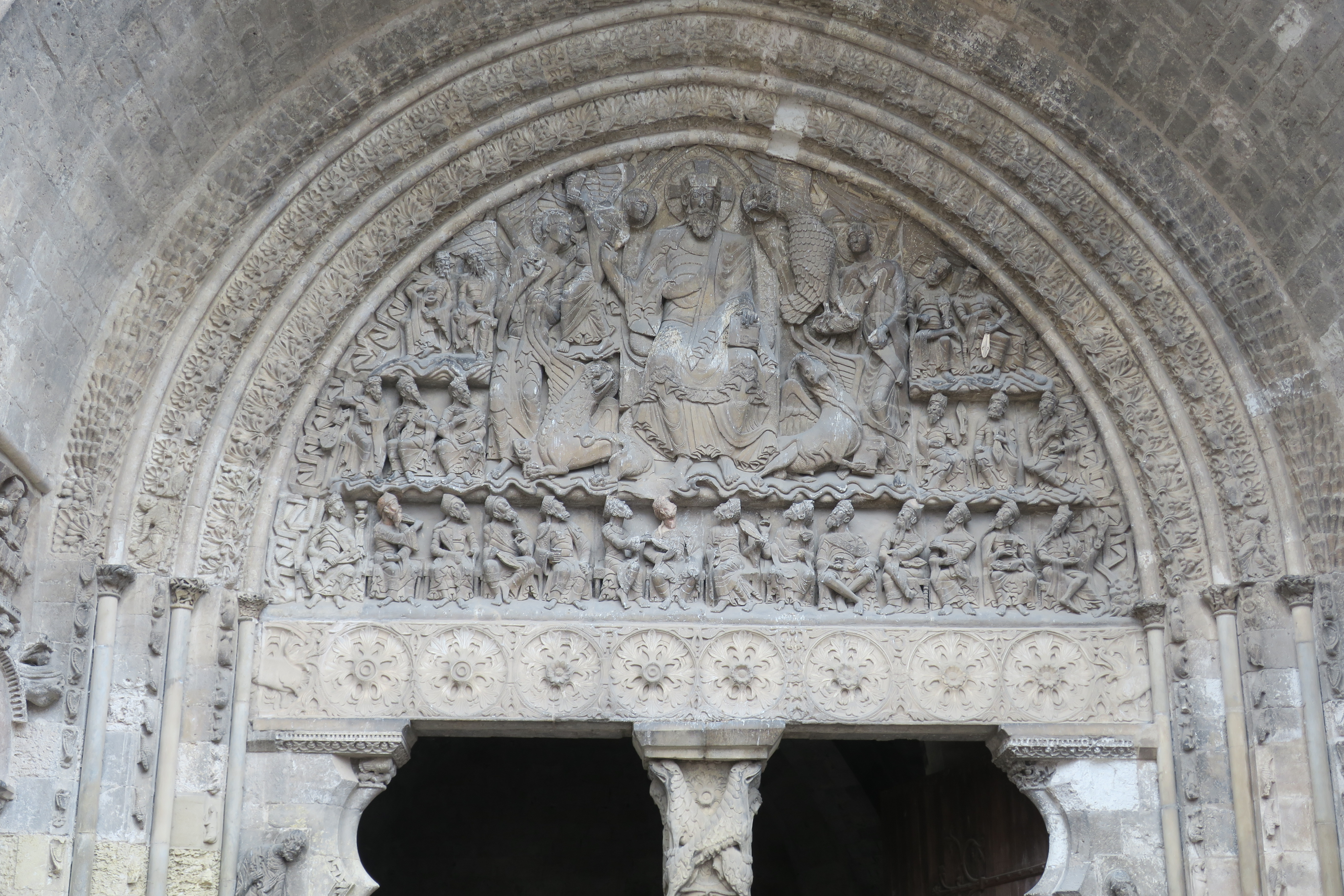 Église Saint-Pierre de Moissac, portail méridional, tympan .